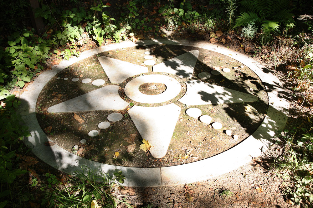 Vortex Garten Darmstadt